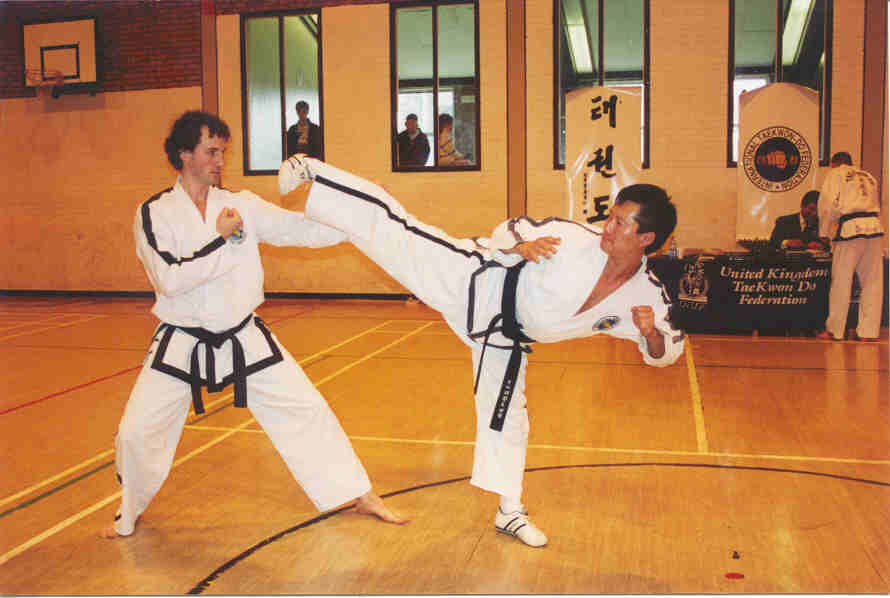 Mr. Choi Jung Hwa hijo del General Choi Hong Hi y Mr. Carlos Martín Requejo, Presidente de la Federación Internacional de Taekwon-do España.